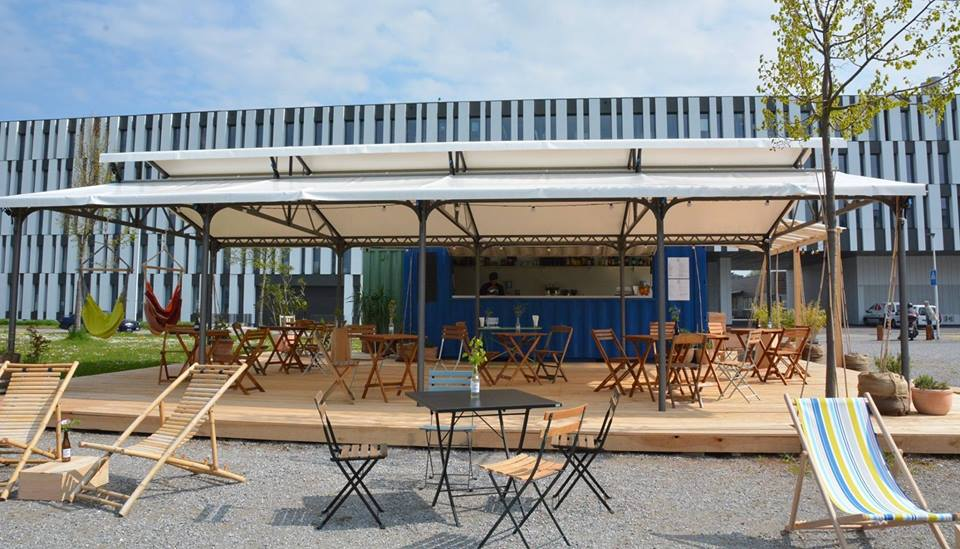 In der Bar Campo werden über die Sommermonate gerne Gäste mit mediterranen Köstlichkeiten verwöhnt